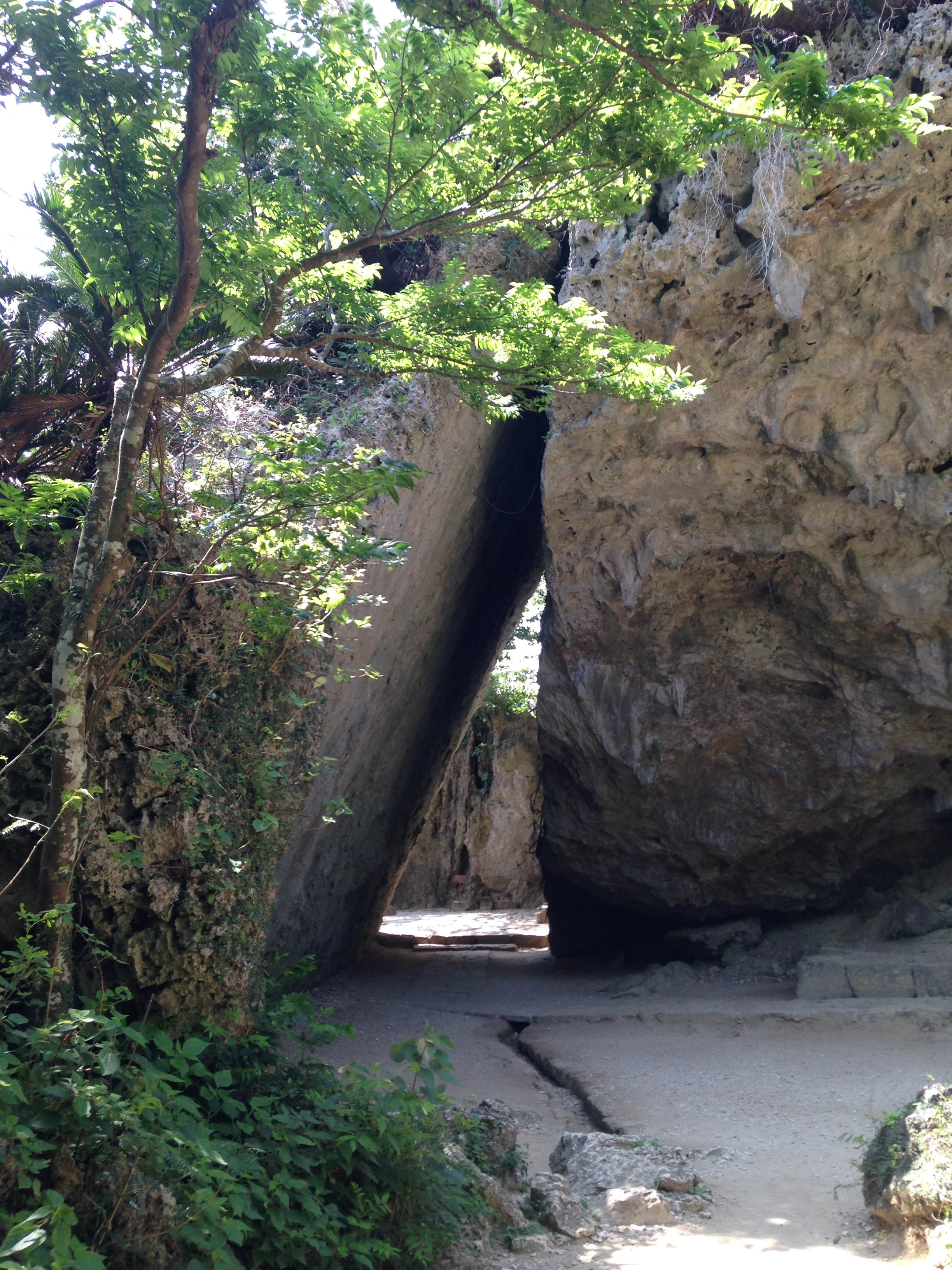 斎場御嶽の三庫理(三角岩)。奥に見える小さな四角い石は「香炉」である